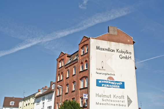 Mönchebergstraße im Wesertor, Kassel